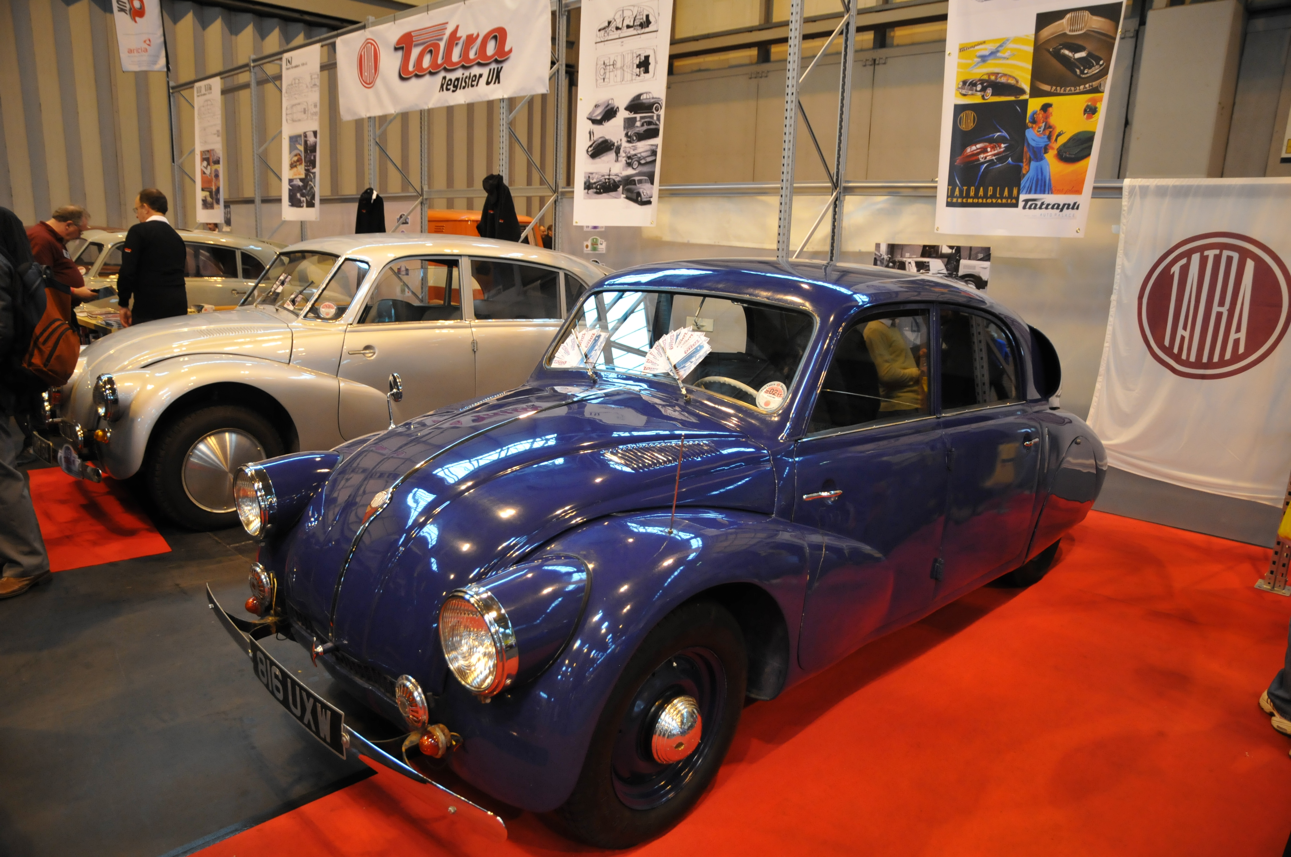 Tatra 97